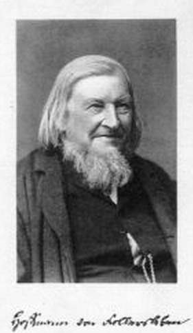 Hoffmann von Fallersleben, Portrait und Unterschrift